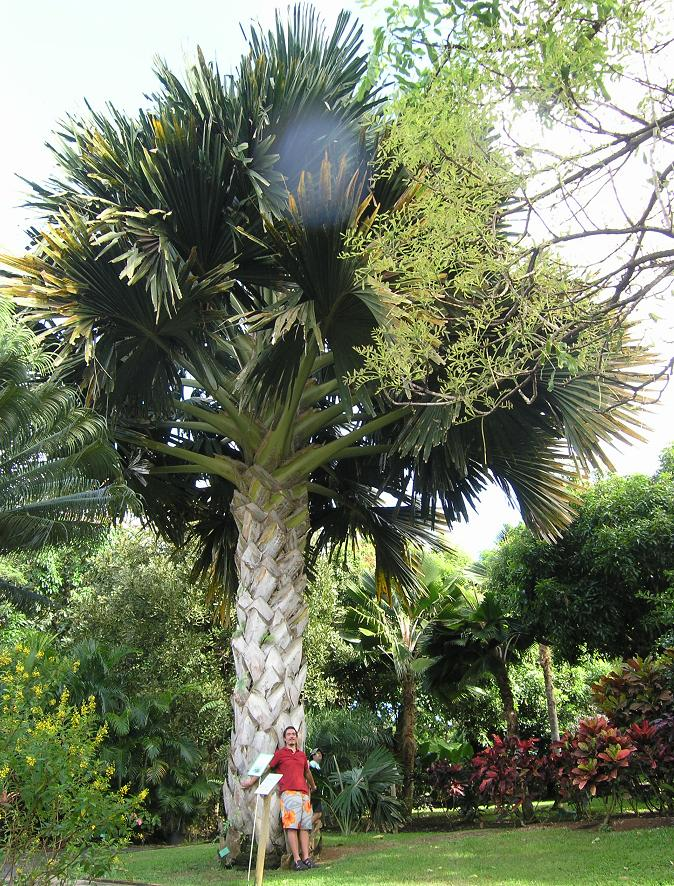 Talipot,_Corypha_umbraculifera,_palmier_géant.JPG Arbre agé d'environ 30-35 ans. Prise au jardon botanique de Deshaie, Guadeloupe, 2005. Je suis l'auteur de cette photo.